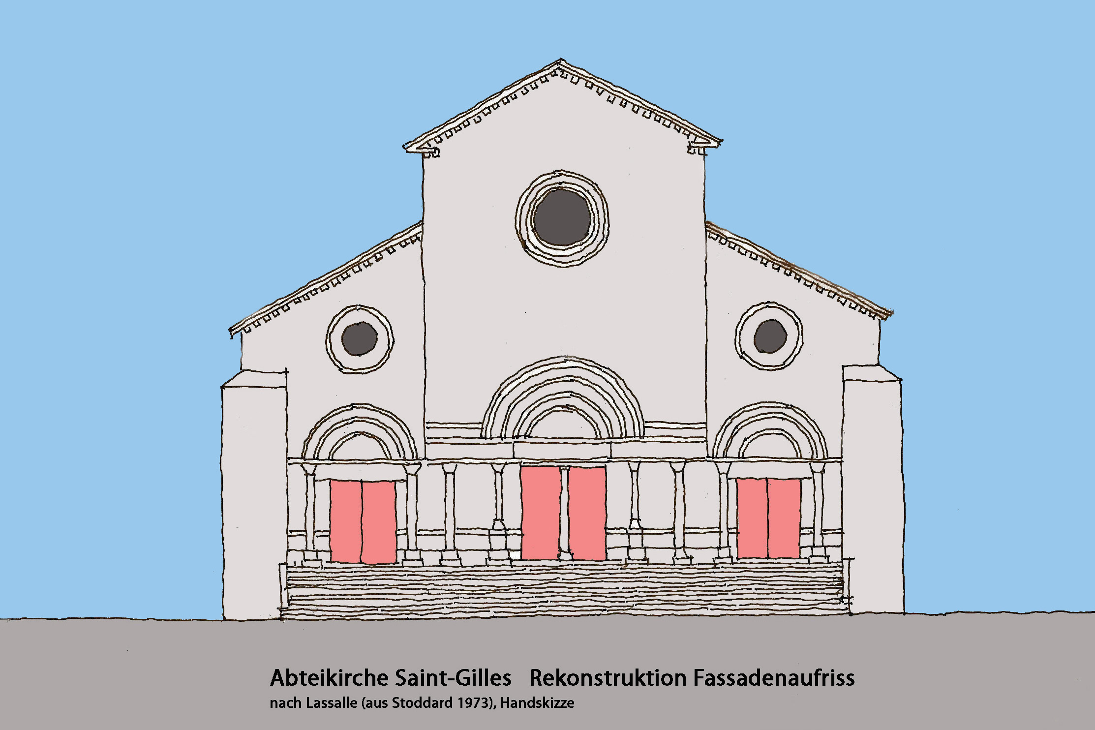 Abteikirche_St-Gilles_Rekonstruktion_Fassadenaufriss, Handskizze